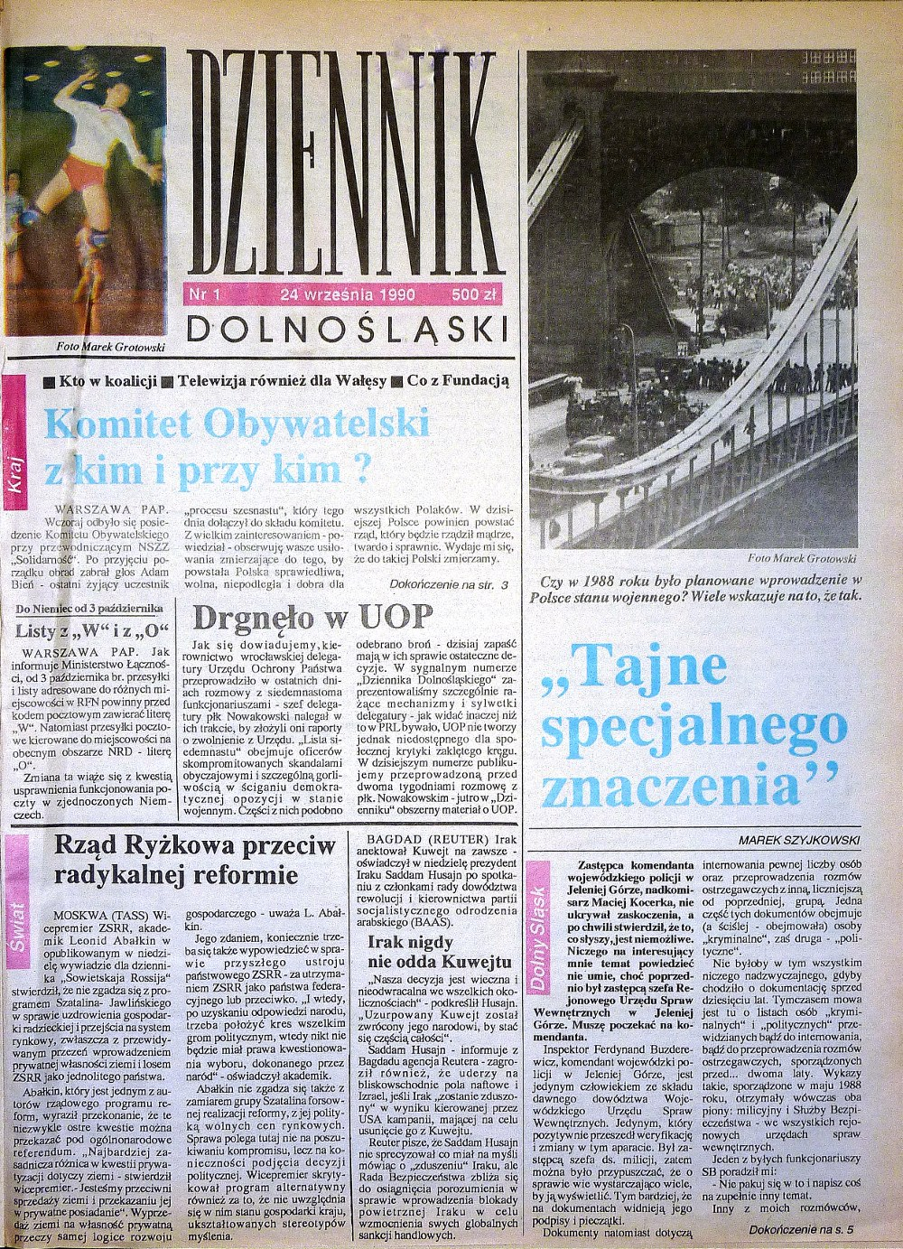 Dziennik Dolnośląski numer pierwszy (24 września 1990)